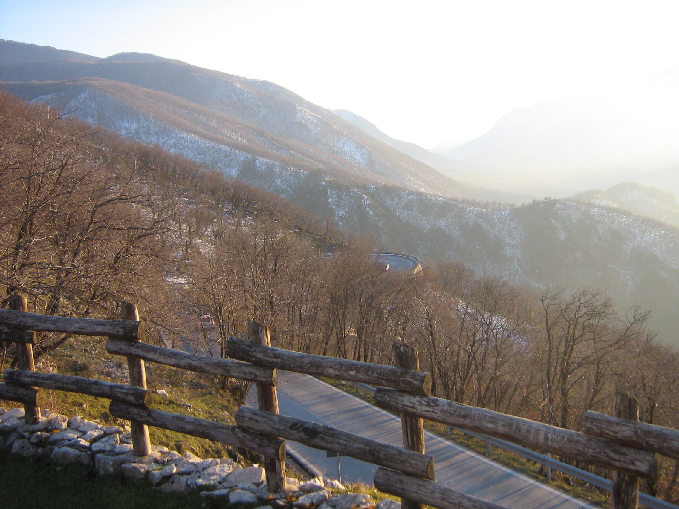 Foto scattata da me, a Marzo 2008.